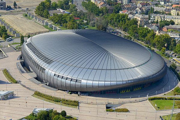 Légi felvételen a Papp László Budapest Sportaréna